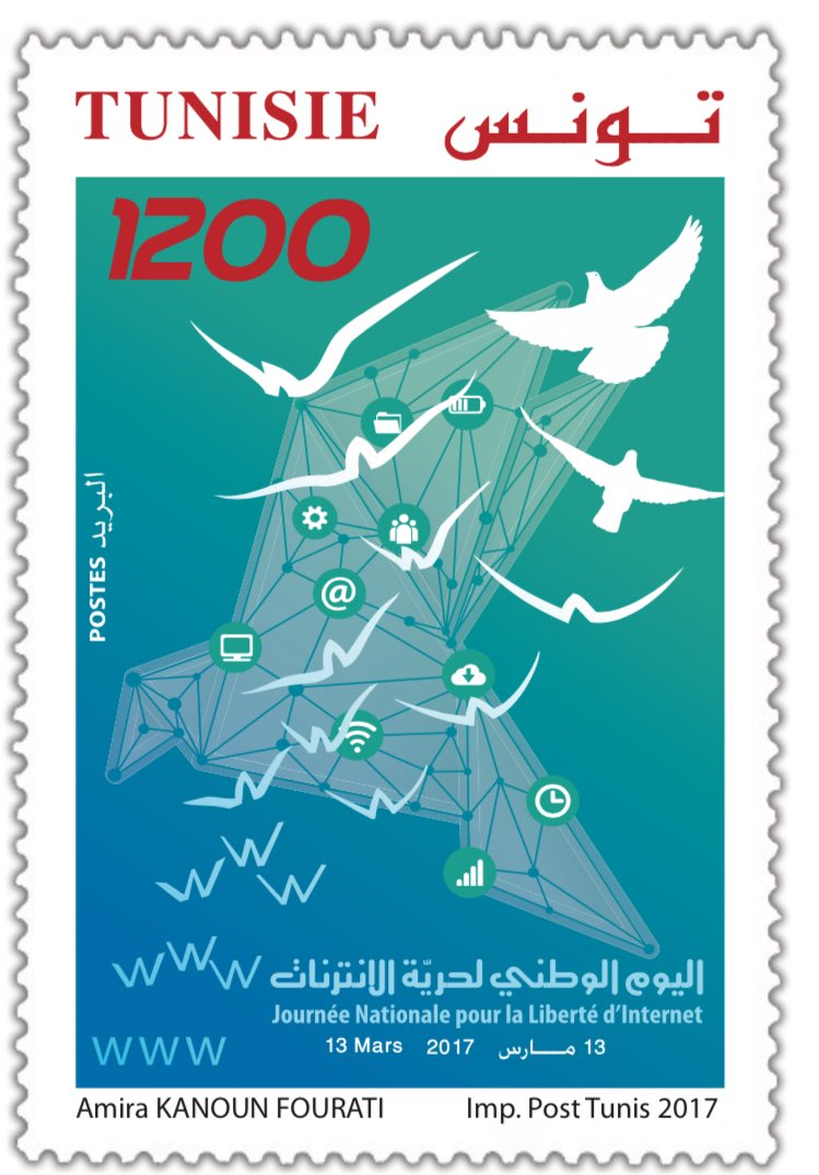 Timbre postal tunisien mis en vente à l'occasion de la Journée nationale pour la liberté d'Internet